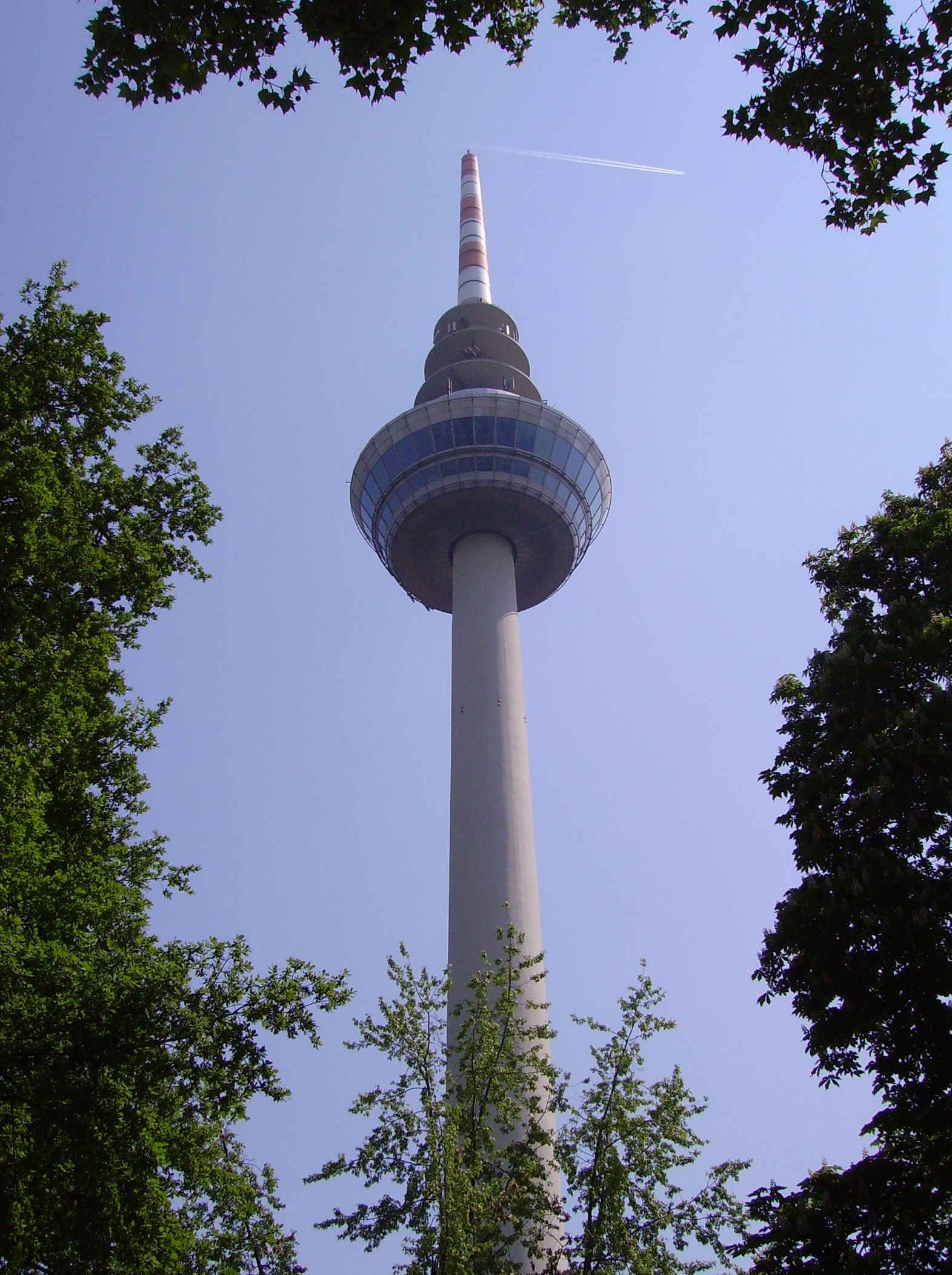 Luisenpark in Mannheim, Germany